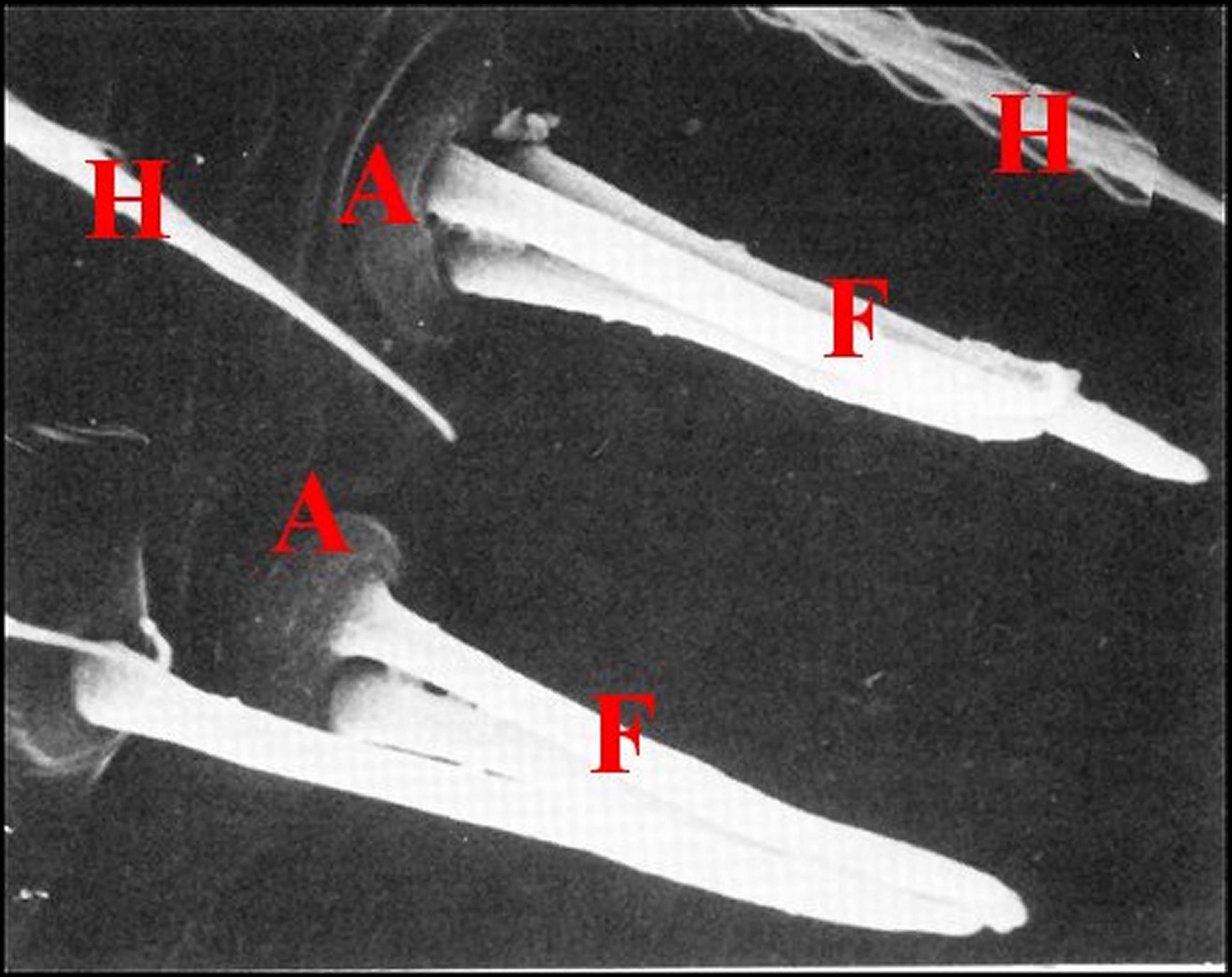 Deux groupes de fusules épigastriques prégonoporales de Philoponella sp. (Guyane) mâle. Microscope électronique à balayage.